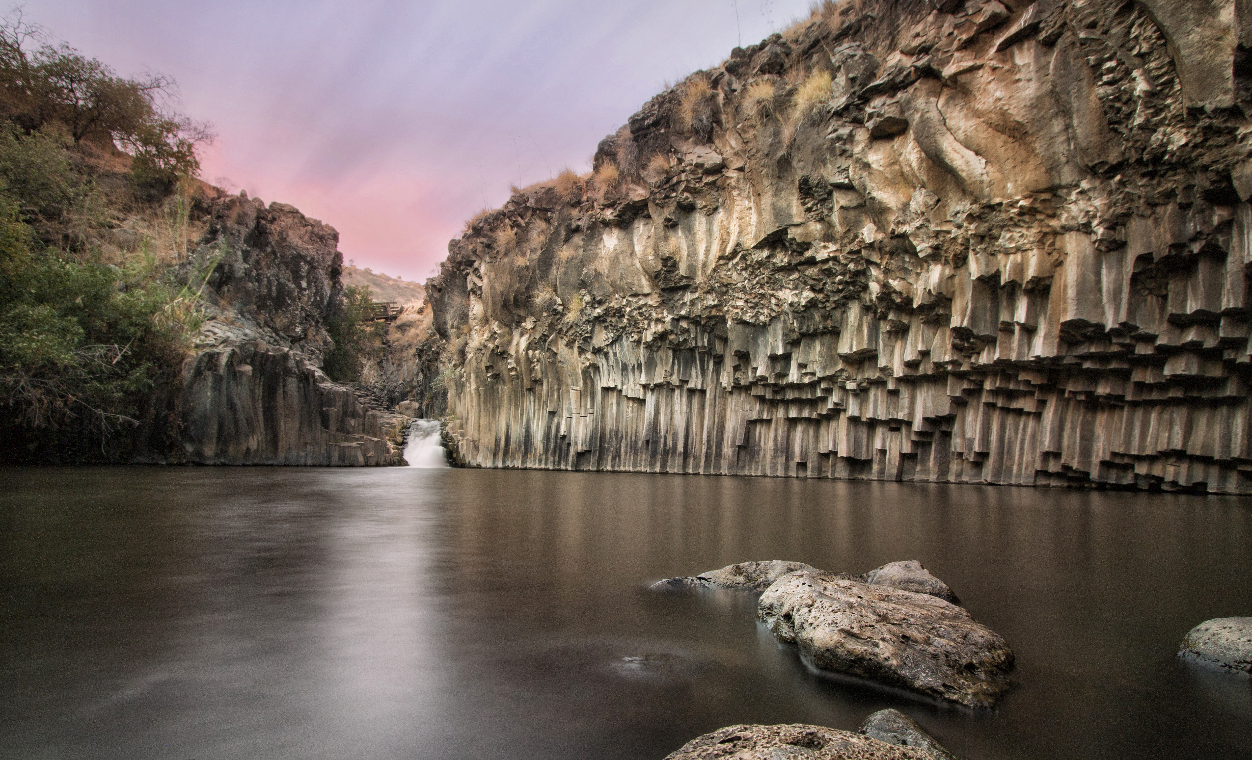 תמונת חשיפה ארוכה על בְּרֵכַת הַמְּשֻׁשּׁים, הוא כינויה של בריכה טבעית המצויה בנחל משושים בחלקה המרכזי-דרומי של רמת הגולן. הבריכה זכתה לשמה בזכות עמודי מסלע הבזלת בעלי חתך משושה.